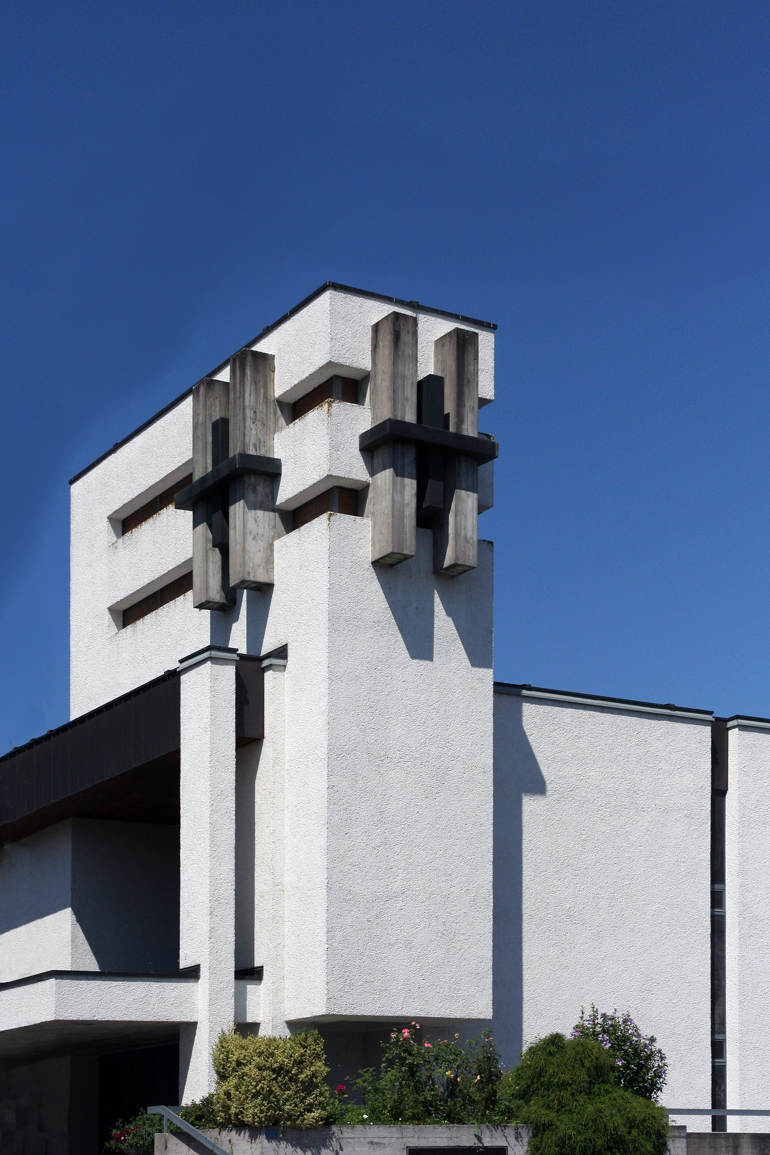 Römisch-katholische Pfarrkirche St. Josef Dietikon, Kirchturm